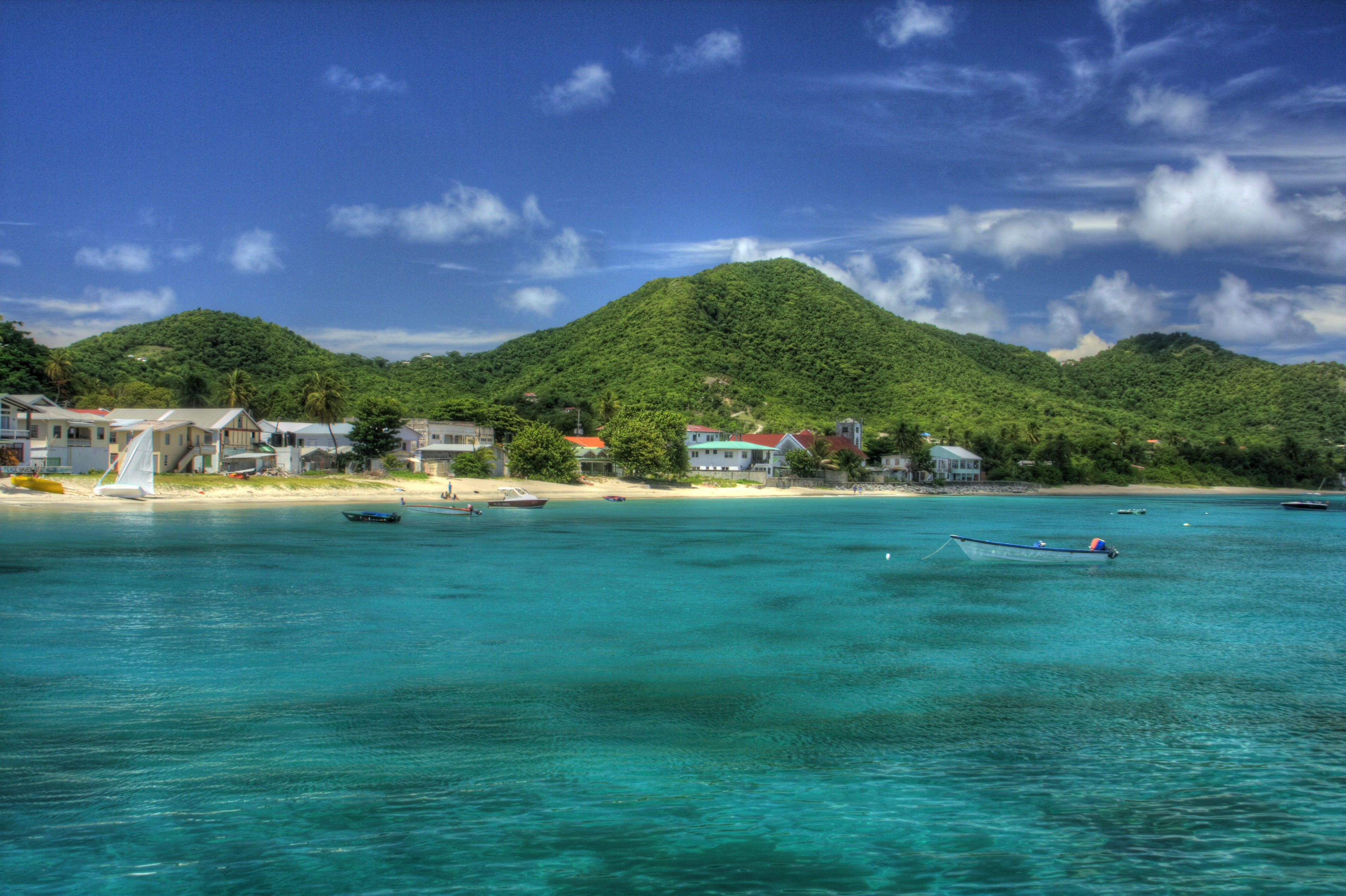 Carriacou visto da una barca